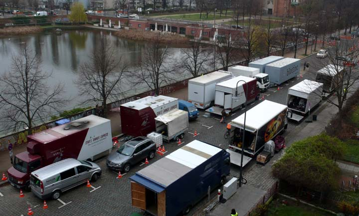 Set de la pelicula Jason Bourne en Leuschnerdamm en Kreuzberg